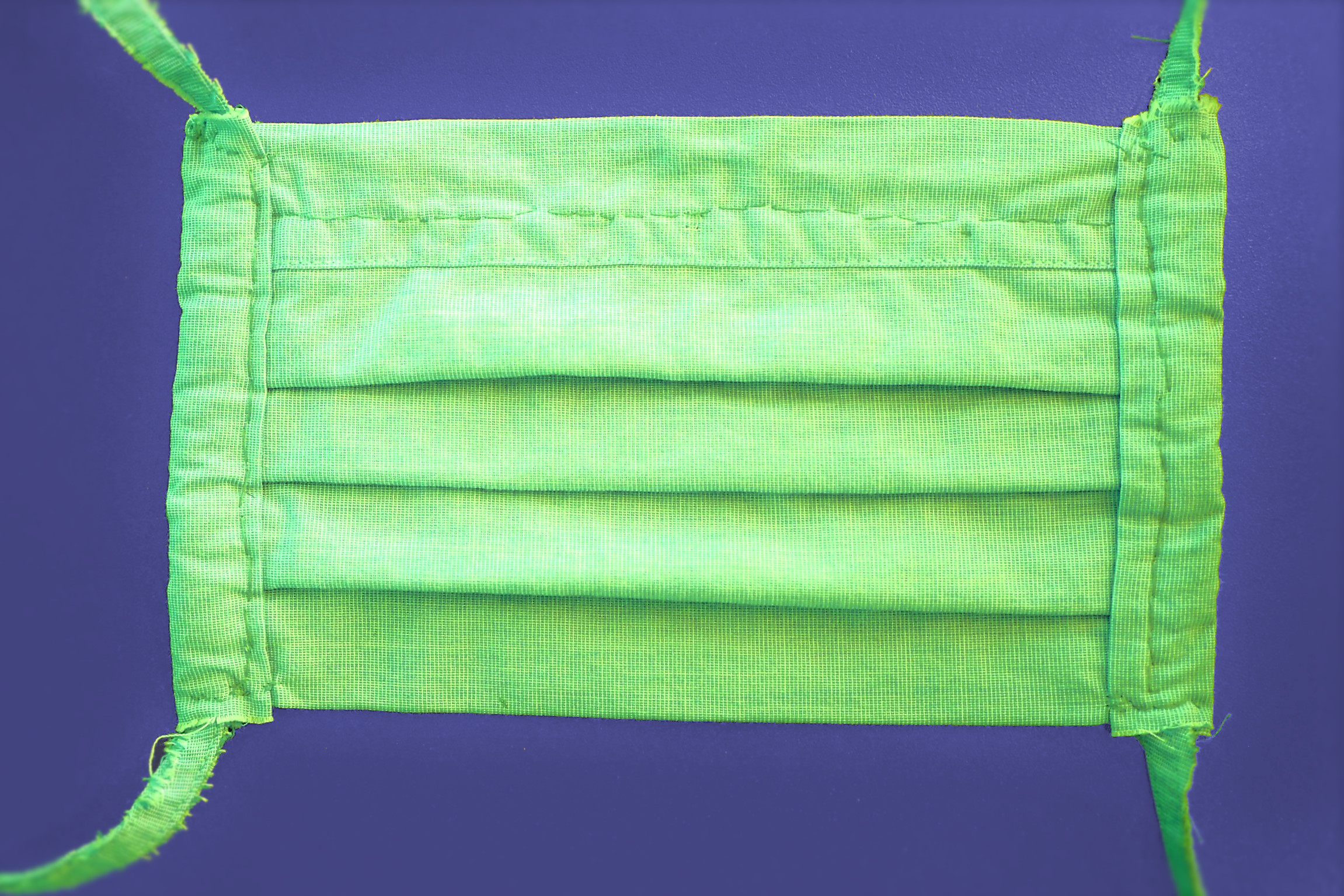 "Behelfs-Mund-und-Nasenmaske" / "Behelfs-Mund-Nasen-Schutz" / "mund- und nasenbedeckende Maske" / "Community mask". Von einem Laien aus zwei Lagen von grünem Baumwollstoff genäht. Die Bänder werden oberhalb und unterhalb der Ohren hinter dem Kopf zusammengebunden. Solche Masken tragen viele Menschen während der Covid-19-Pandemie. Fast überall in Deutschland besteht seit dem 27.04.2020 die Pflicht, u. a. in Einzelhandelsgeschäften und in öffentlichen Verkehrsmitteln Mund und Nase zu bedecken.